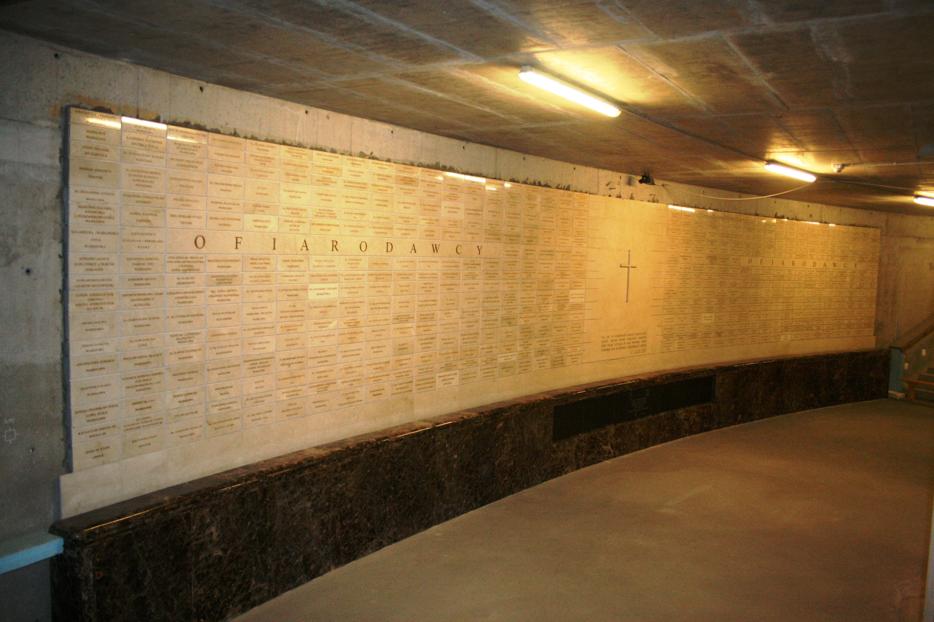 Ściana darczyńców w dolnym kościele Świątyni Opatrzności Bożej w Warszawie